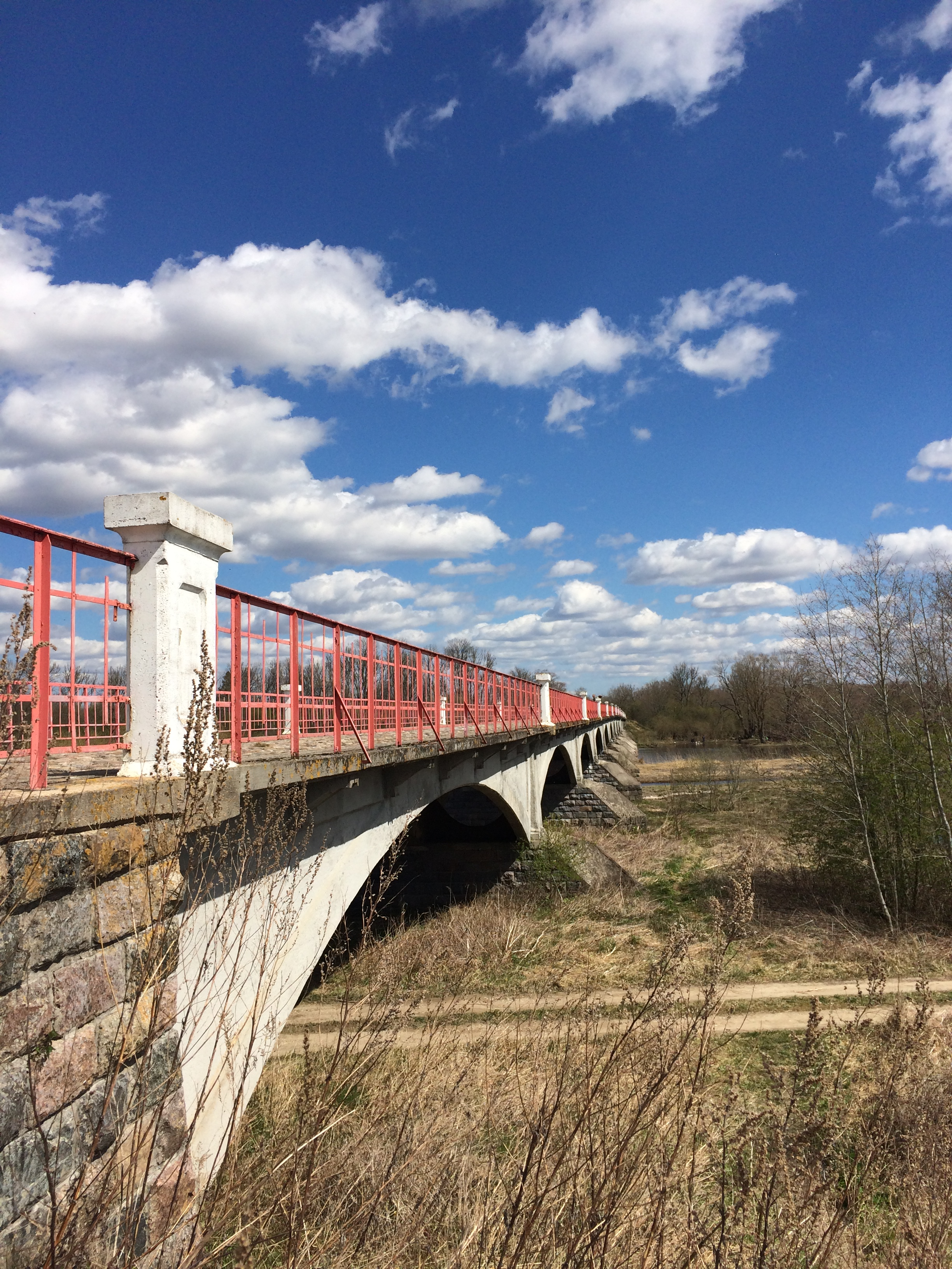 Kasari sild